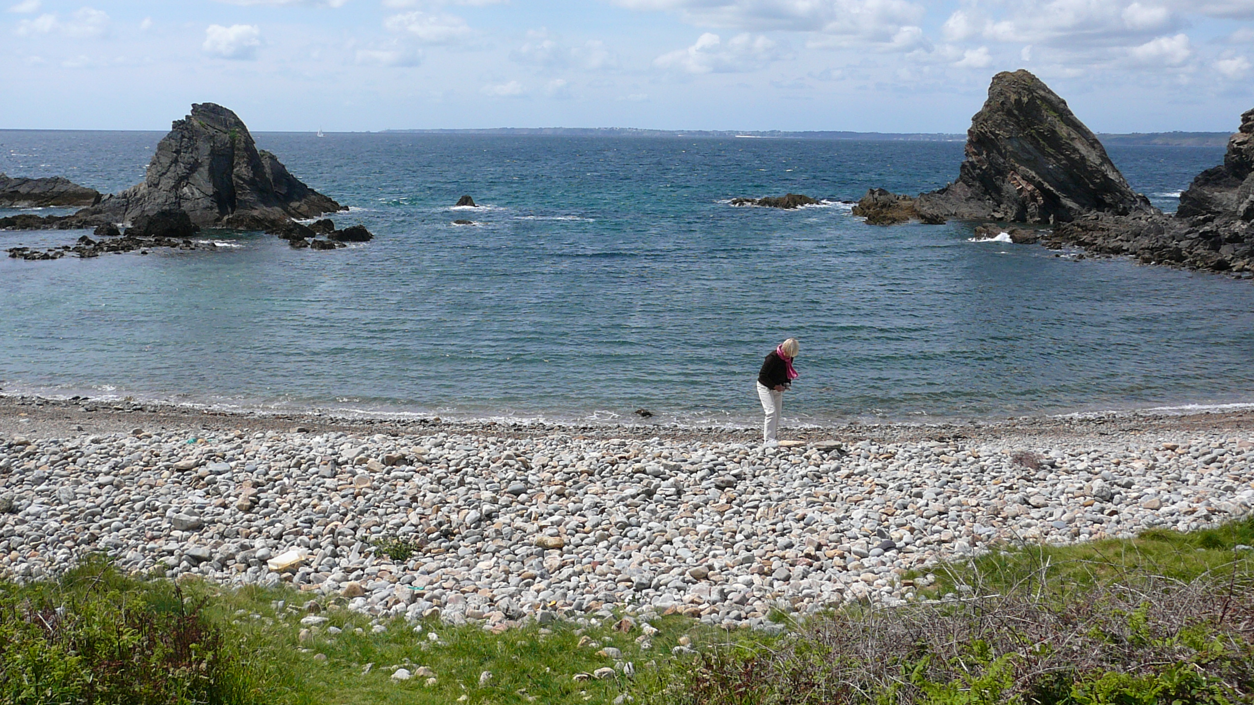 Presqu'île de Crozon : la plage de Trez Rouz